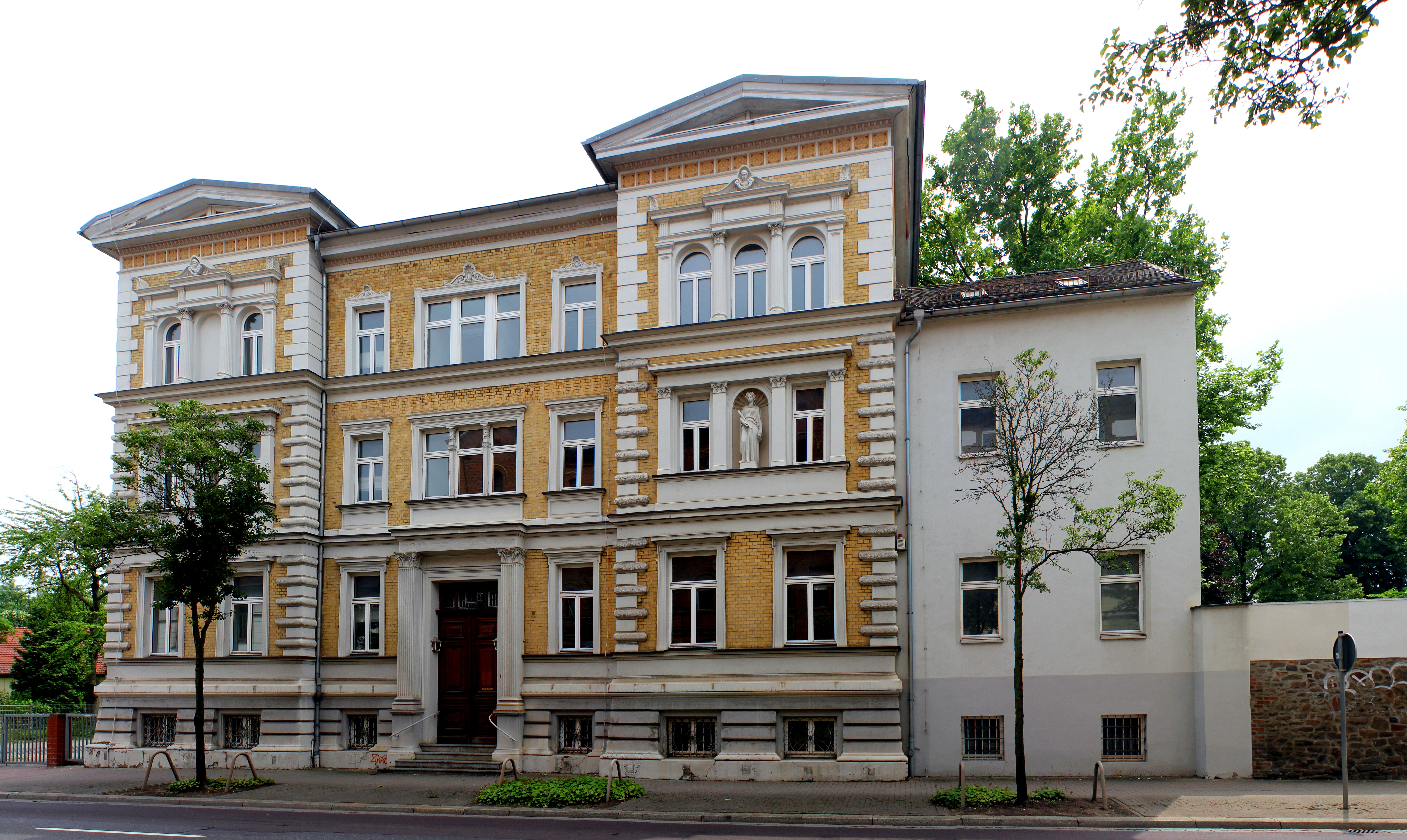 Villa, Mittagstraße 15, Magdeburg